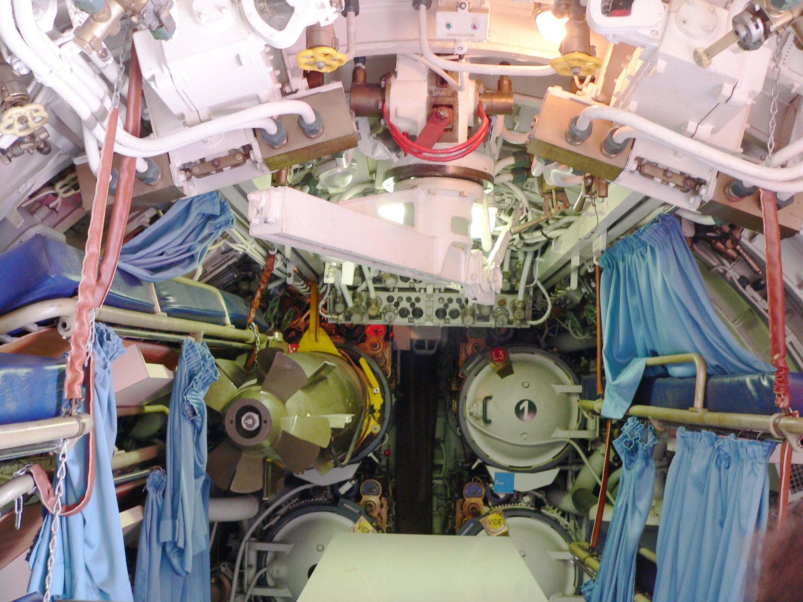 Argonaute